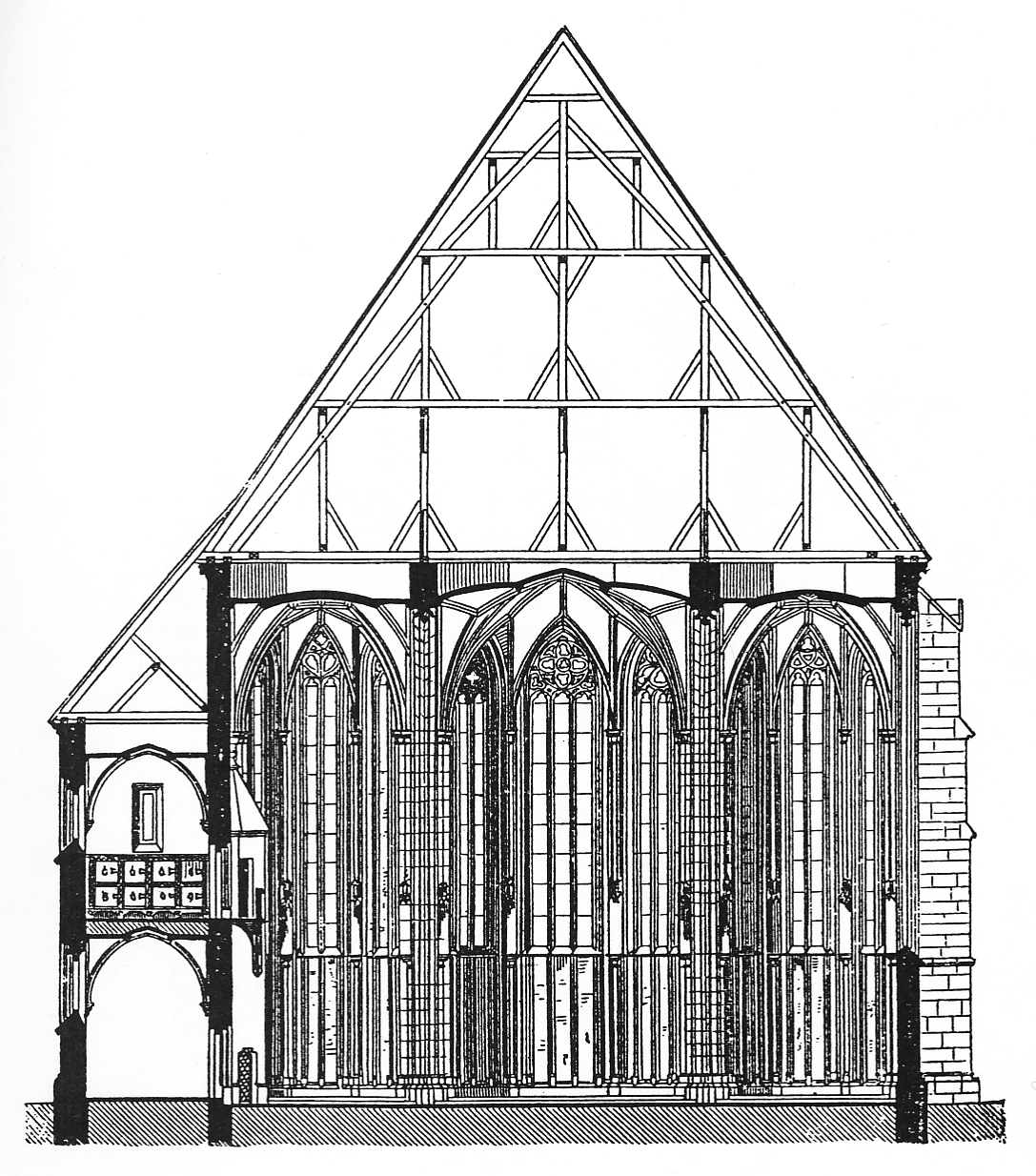 Querschnitt der Steyrer Stadtpfarrkirche nach Hermann von Riewel